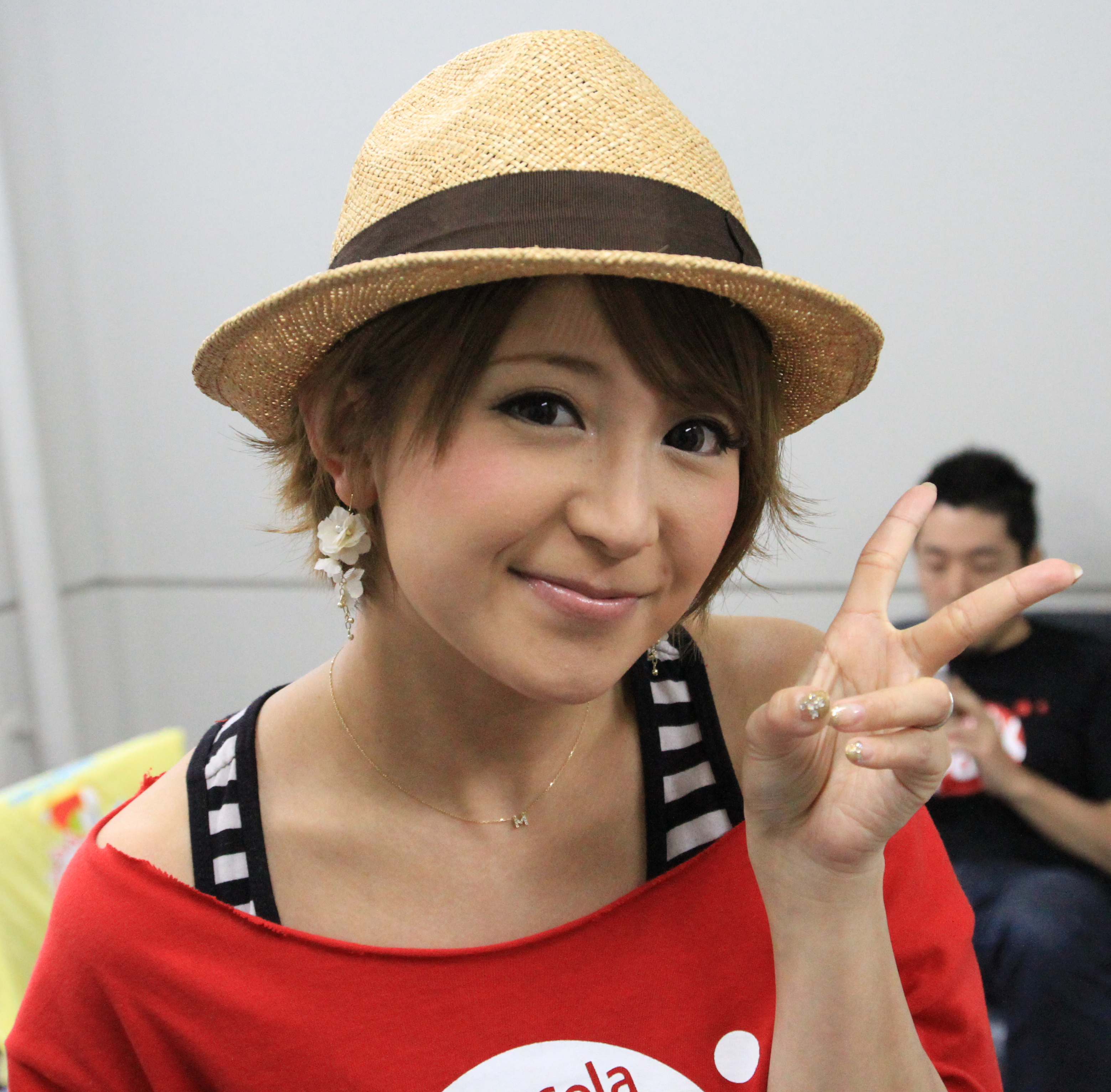 Mari Yaguchi